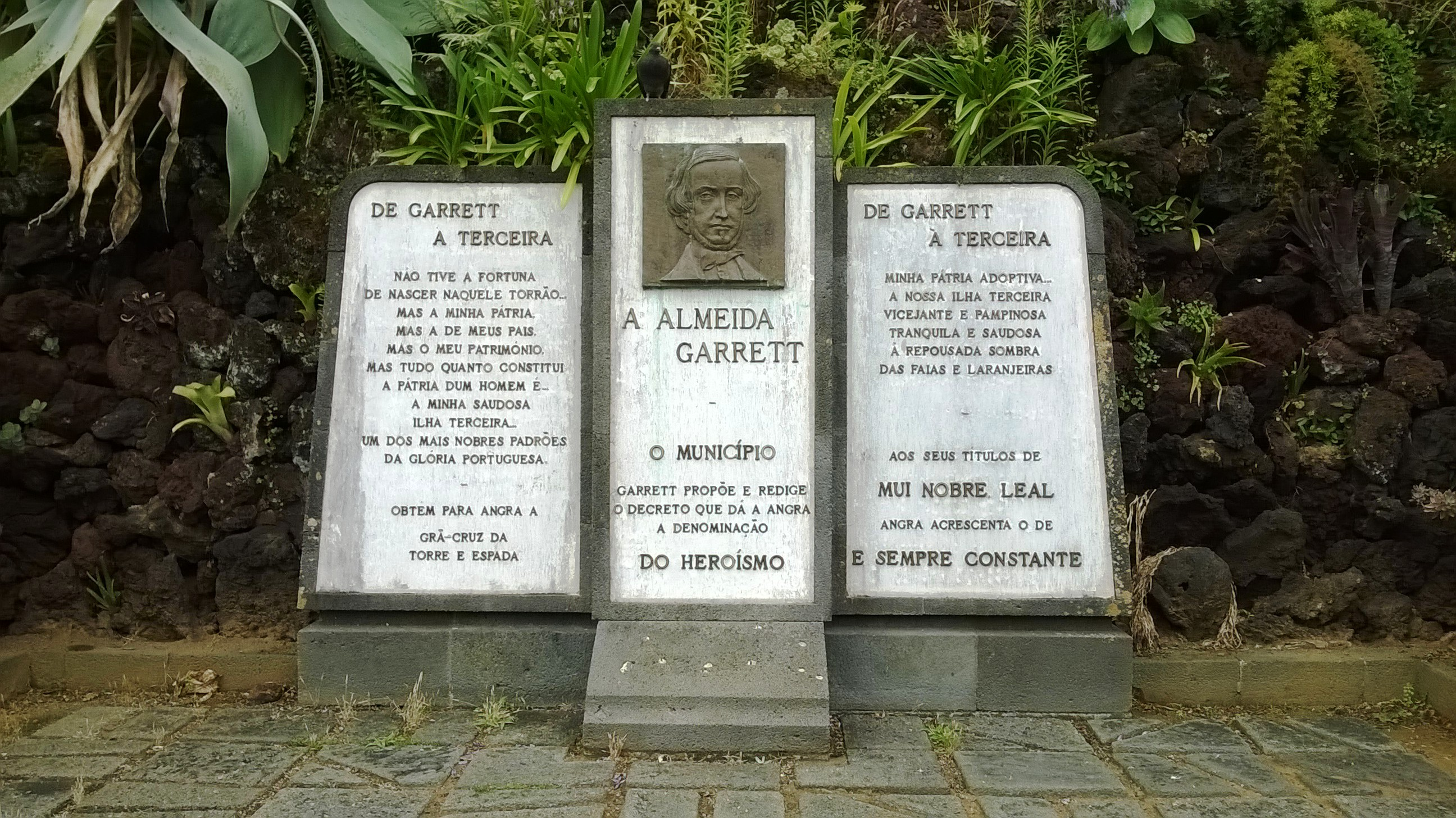 "A Almeida Garrett / O Município": monumento em homenagem ao escritor português Almeida Garrett. Jardim Duque da Terceira, concelho de Angra do Heroísmo, ilha Terceira, Região Autónoma dos Açores, Portugal.